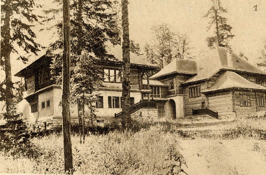 Краљев дворац Хан Пијесак. Фотографисано 1928. године, новине Илустровани лист.